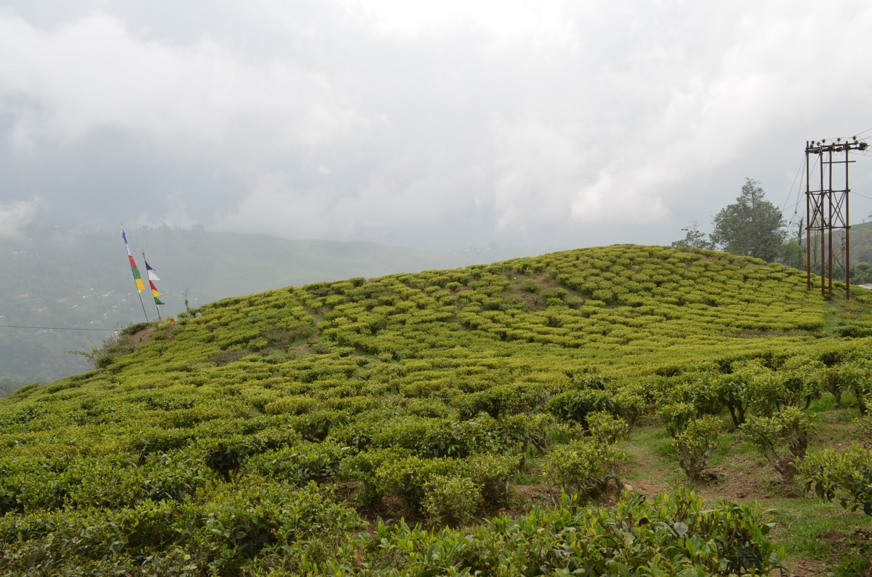 Happy Valley Tea Estate in Darjeeling.